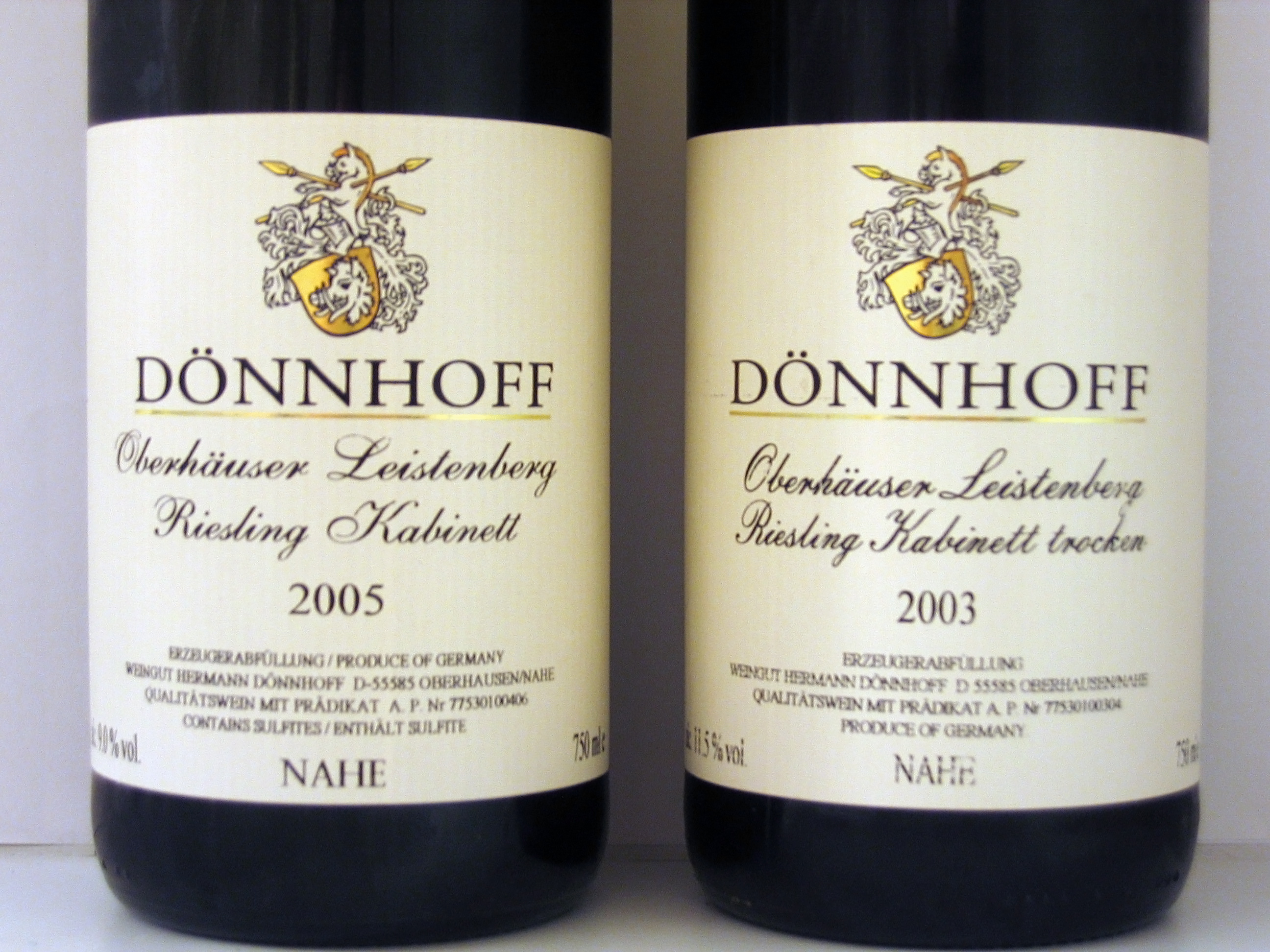 Riesling Kabinett and Riesling Kabinett trocken from the same producer (Dönnhoff in Nahe) and vineyard (Oberhäuser Leistenberg)